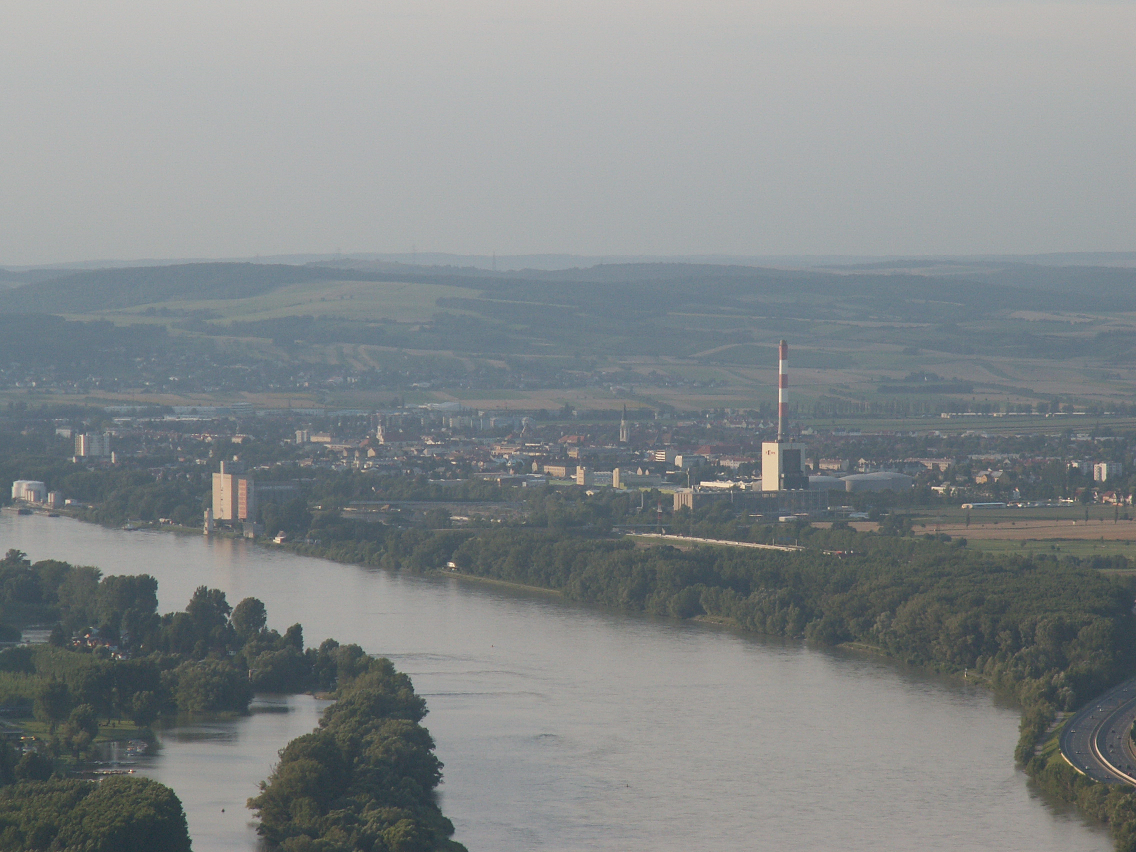 Korneuburg, in Vordergrund die Donau, aufgenommen vom Leopoldsberg aus, Juli 2005 selbst fotografiert mit KonicaMinolta Dimage Z3